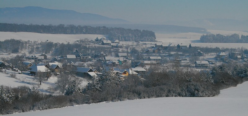 Zimný pohľad na Haláčovce